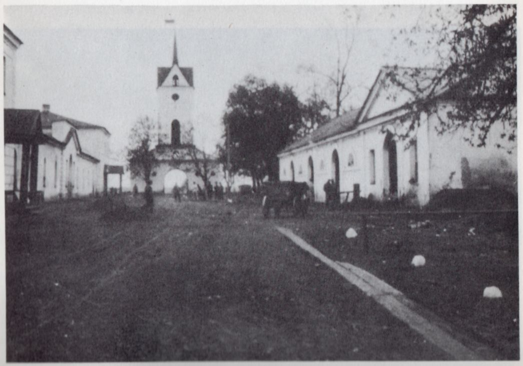 Беларуская (тарашкевіца): Дукора (Dukora), сядзіба Ашторпаў (Aštorp) і Гартынгаў (Harting)